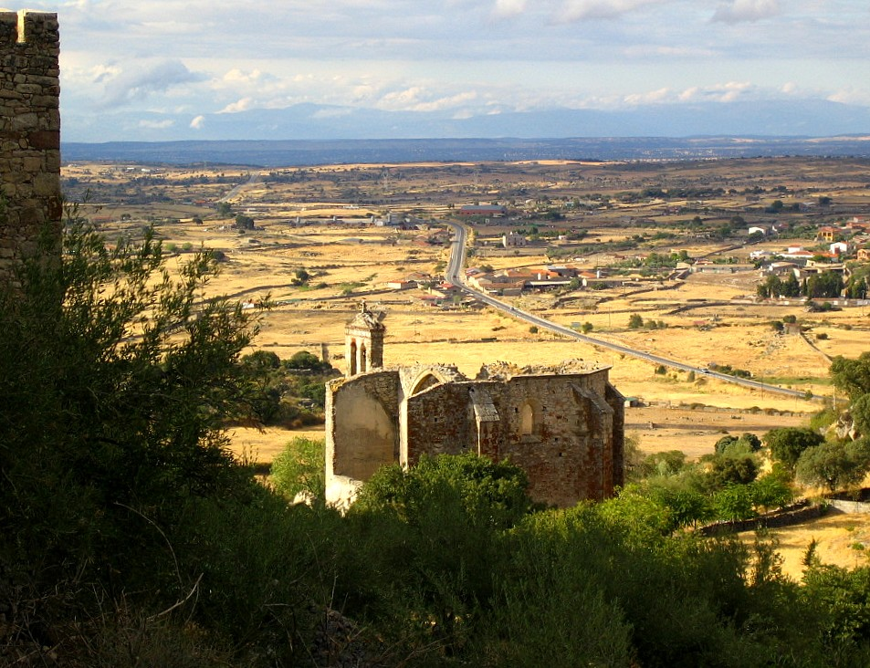 Vue des anciens remparts du château de Trujillo en direction du nord.